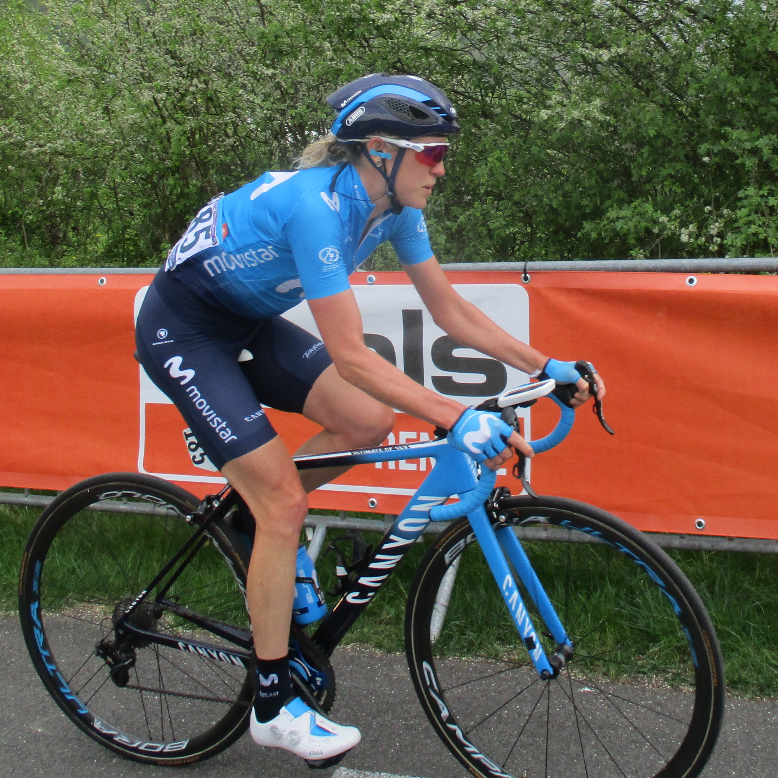 Beklimming van La Redoute tijdens Luik-Bastenaken-Luik 2018 voor vrouwen.